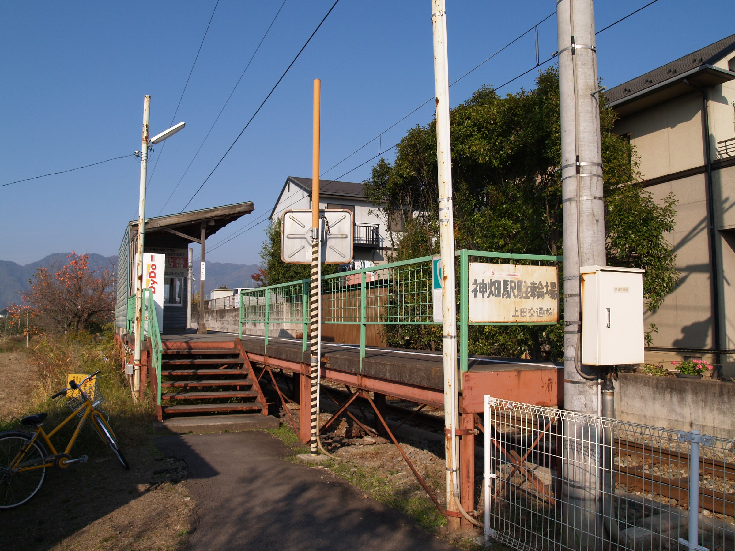 神畑駅